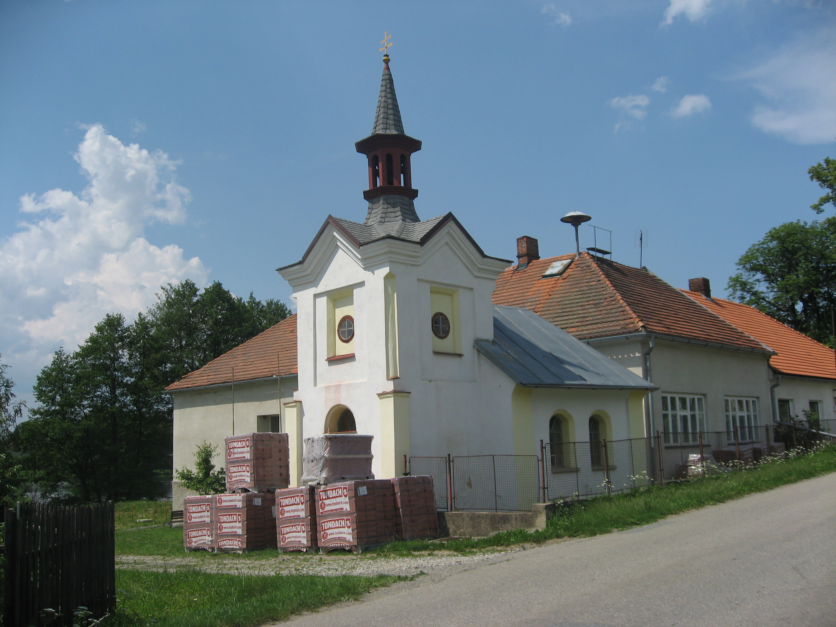 Krasoňov, kaple